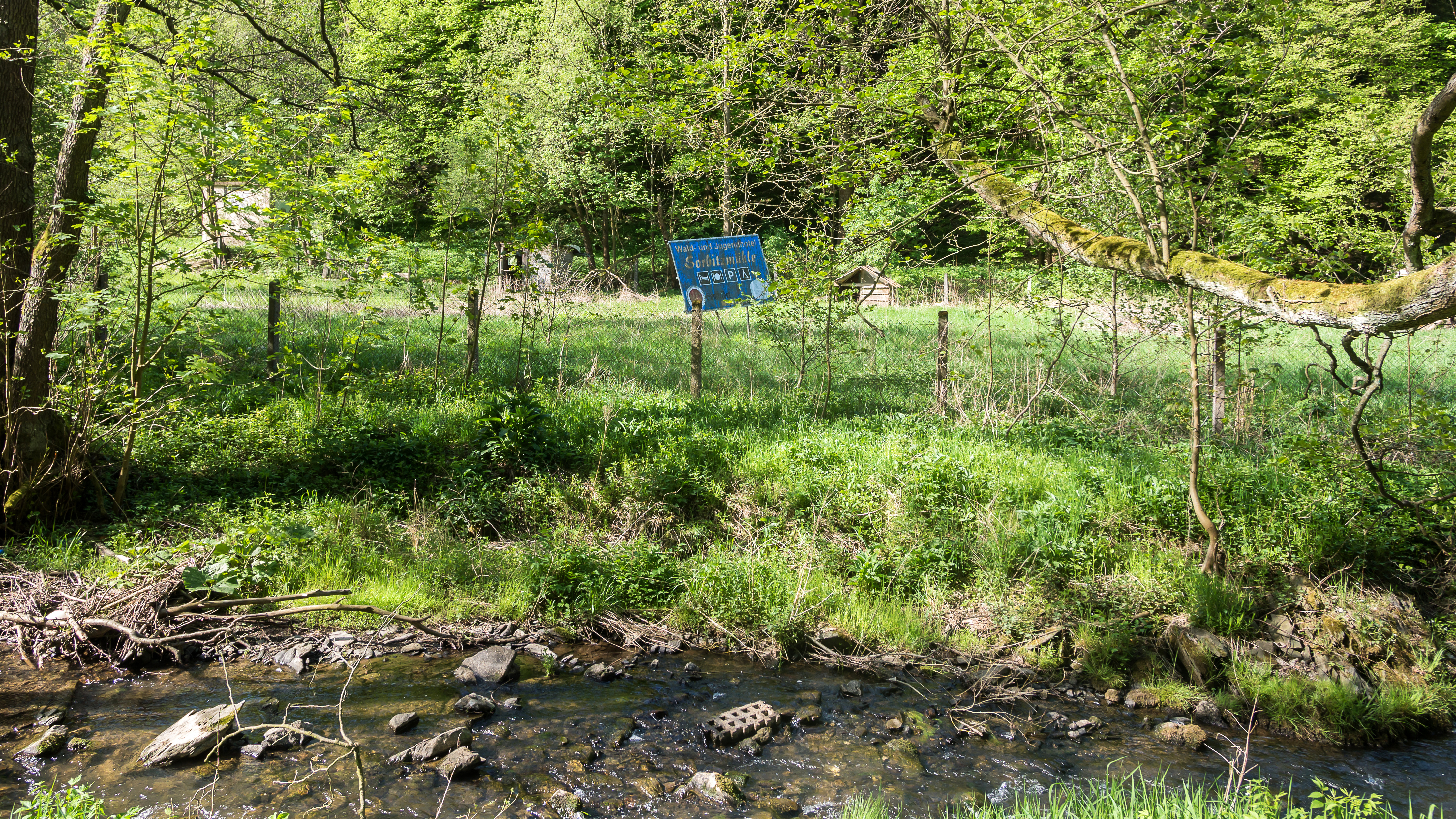 Döschnitz Ortsstraße 56 Wald - und Jugendhotel Sorbitzmühle